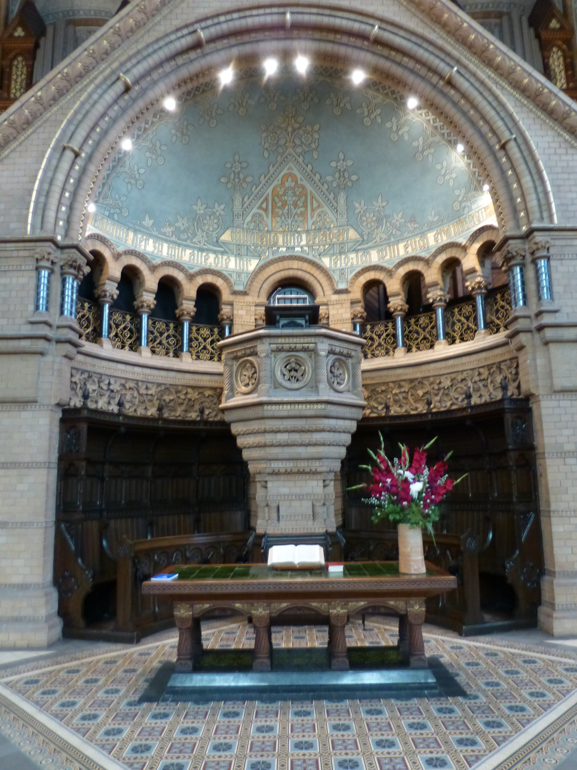 Friedhofskirche (Wuppertal)